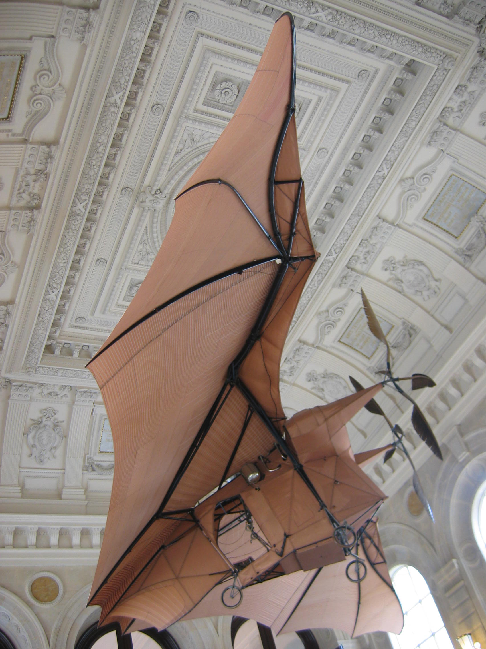 Avion III de Clément Ader. Fotografía hecha en agosto del 2004 en el Museé des arts et métiers de París por Chosovi